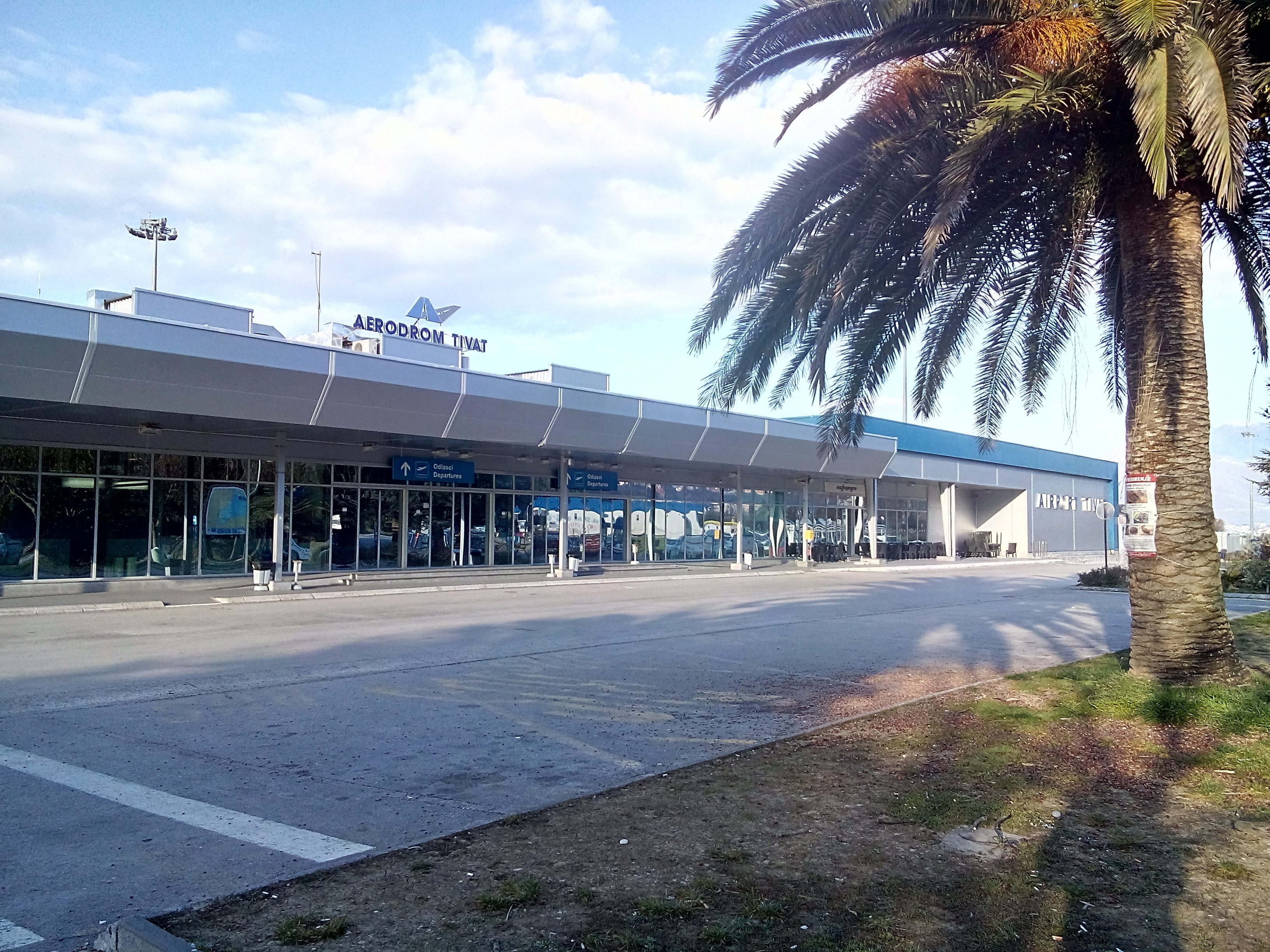 Аэровокзал в Тивате, Черногория